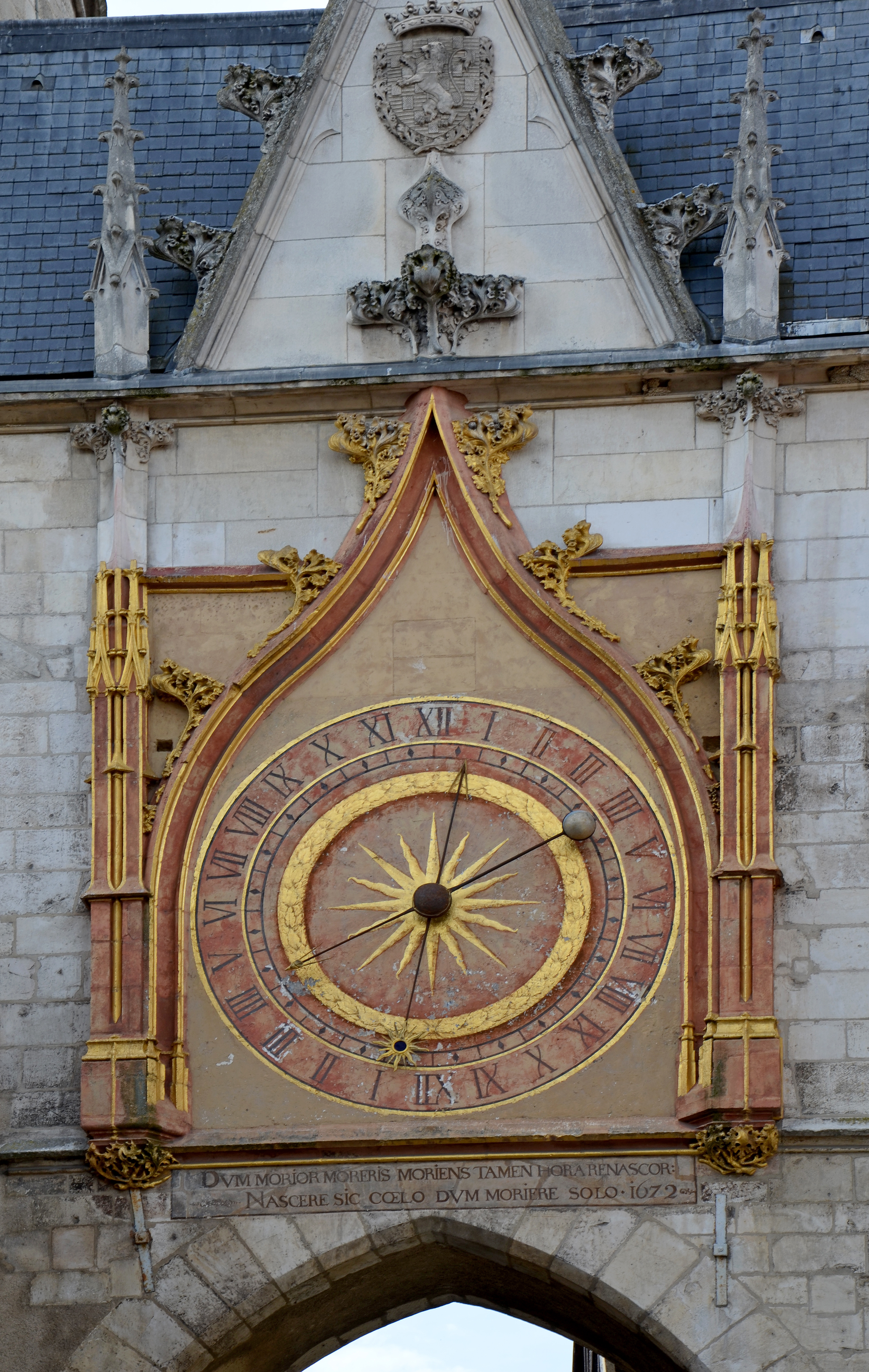 Tour de l'Horloge à Auxerre, Yonne, Bourgogne, France. Face nord-est. Vue vers le sud-ouest depuis le côté de la rue de la Fécauderie et de l'Hôtel de Ville.